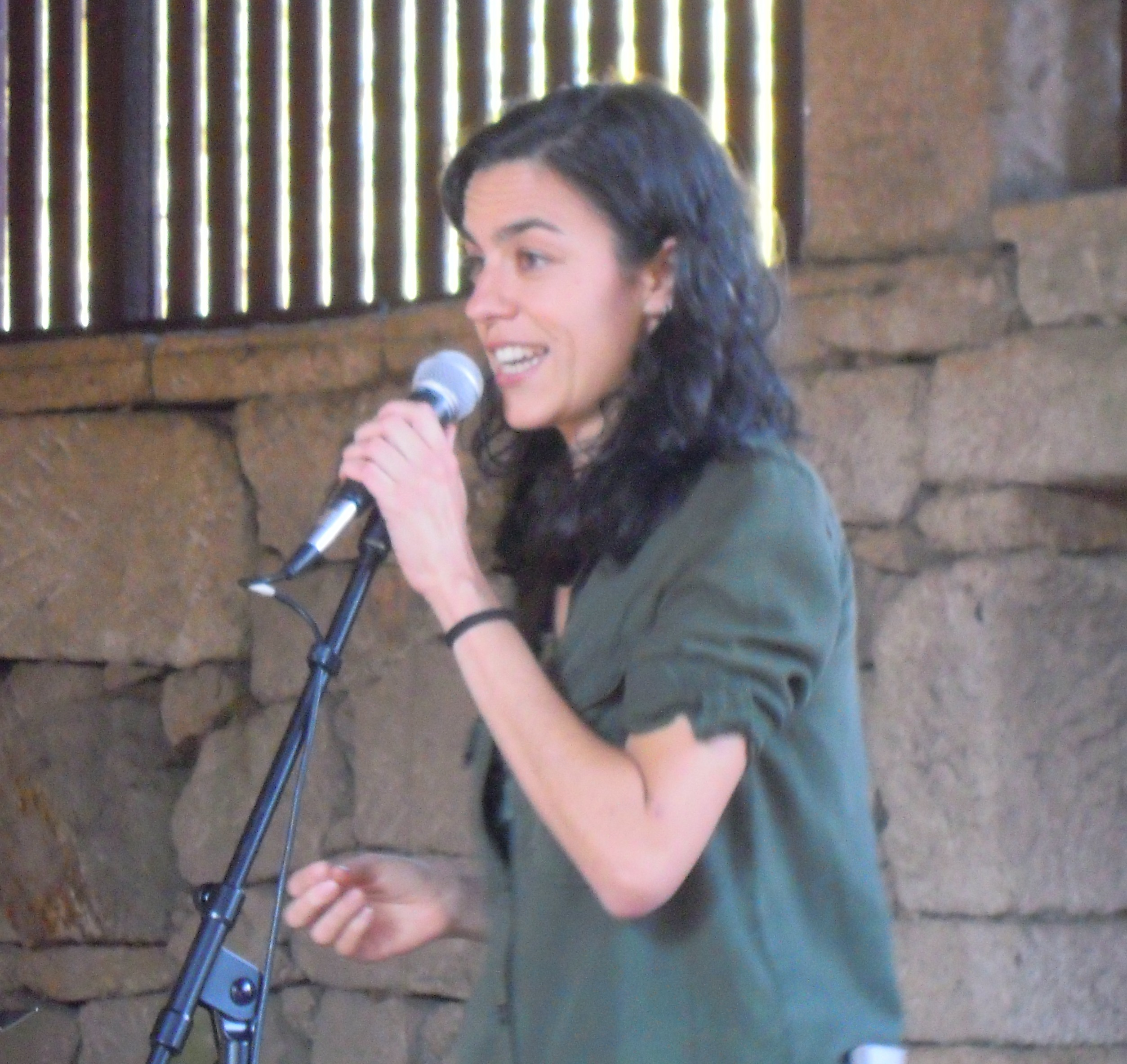 Rosalía Fernández Rial recitando en Allariz